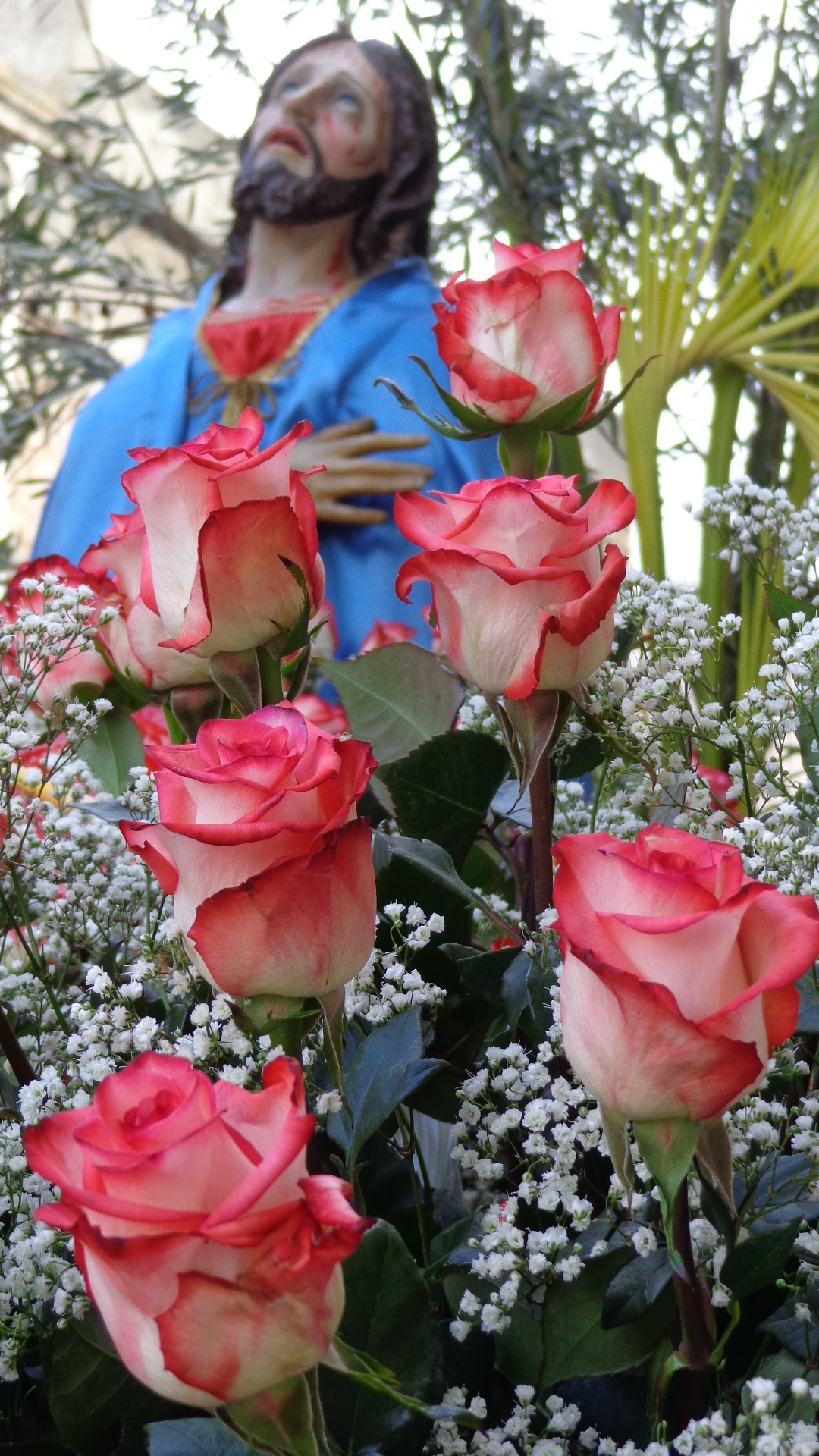 Pasqua 2016 29